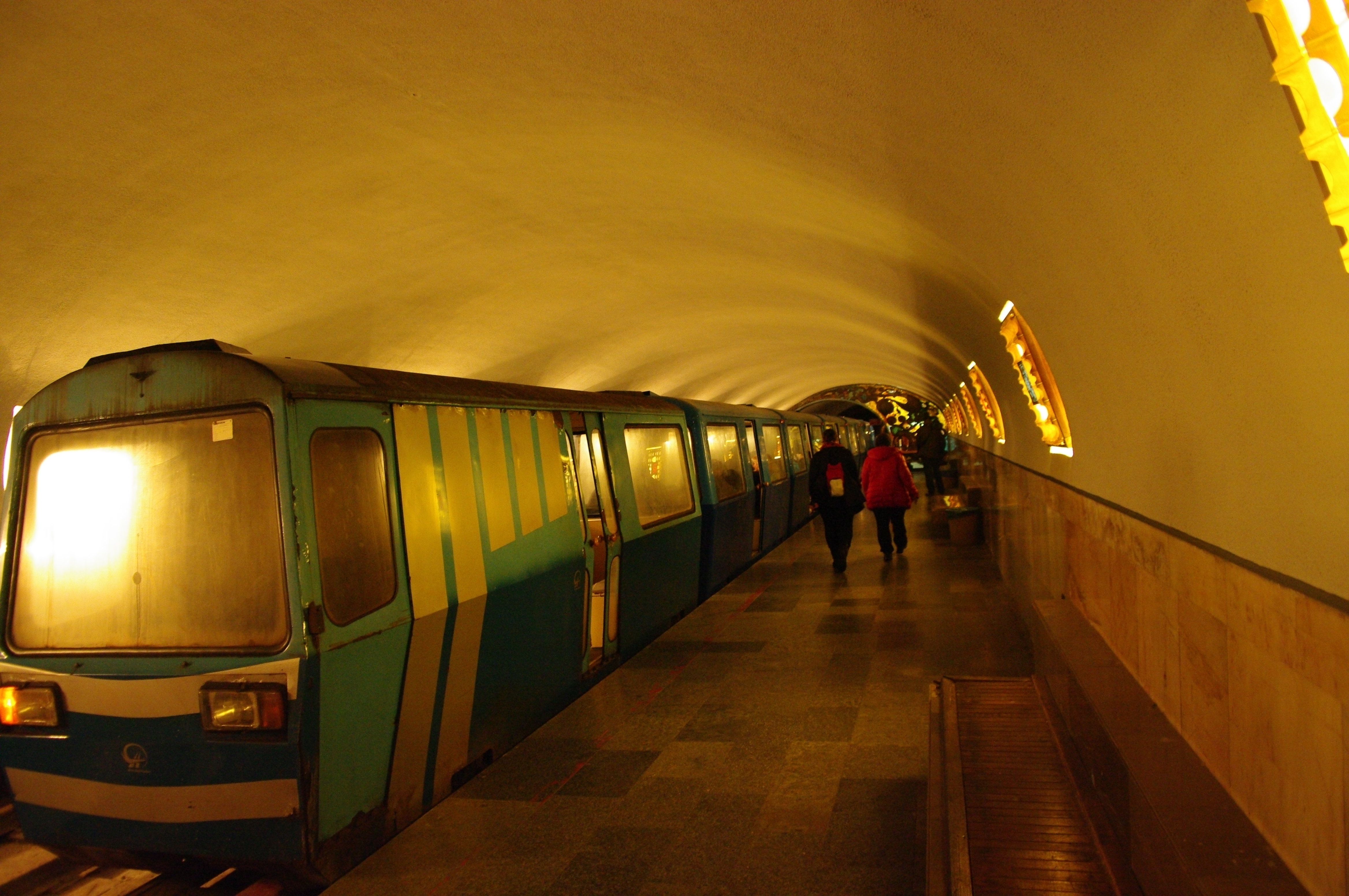 Электропоезд Эп «Турист». Новоафонская пещерная железная дорога